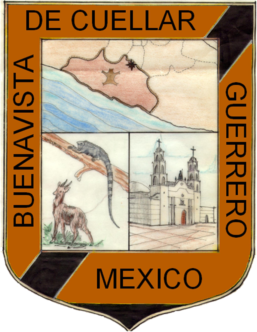 Representa, en su parte superior, el mapa del estado de Guerrero y la ubicación de Buenavista de Cuéllar; también la actividad principal, que es el curtido de pieles. En la parte inferior se muestran dos ejemplares de las pieles que más se explotan. En la zona inferior derecha se aprecia el templo principal, donde se rinde culto a san Antonio de Padua.